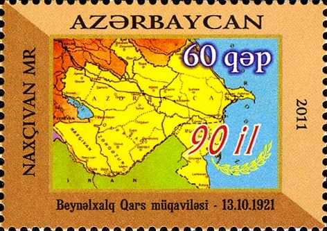 Qars müqaviləsinin 90 illiyi